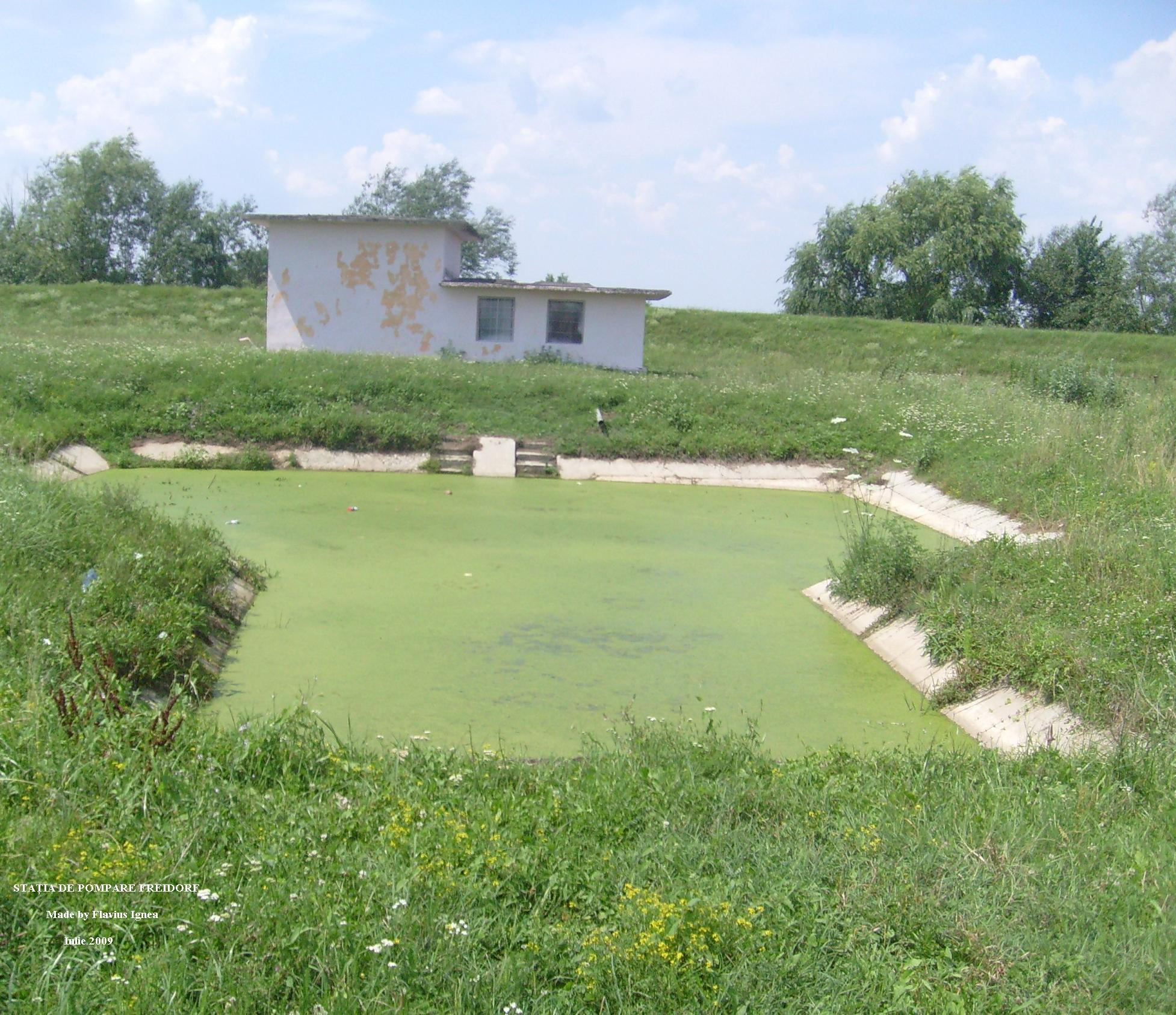 Fişier:Staţia de Pompare Freidorf